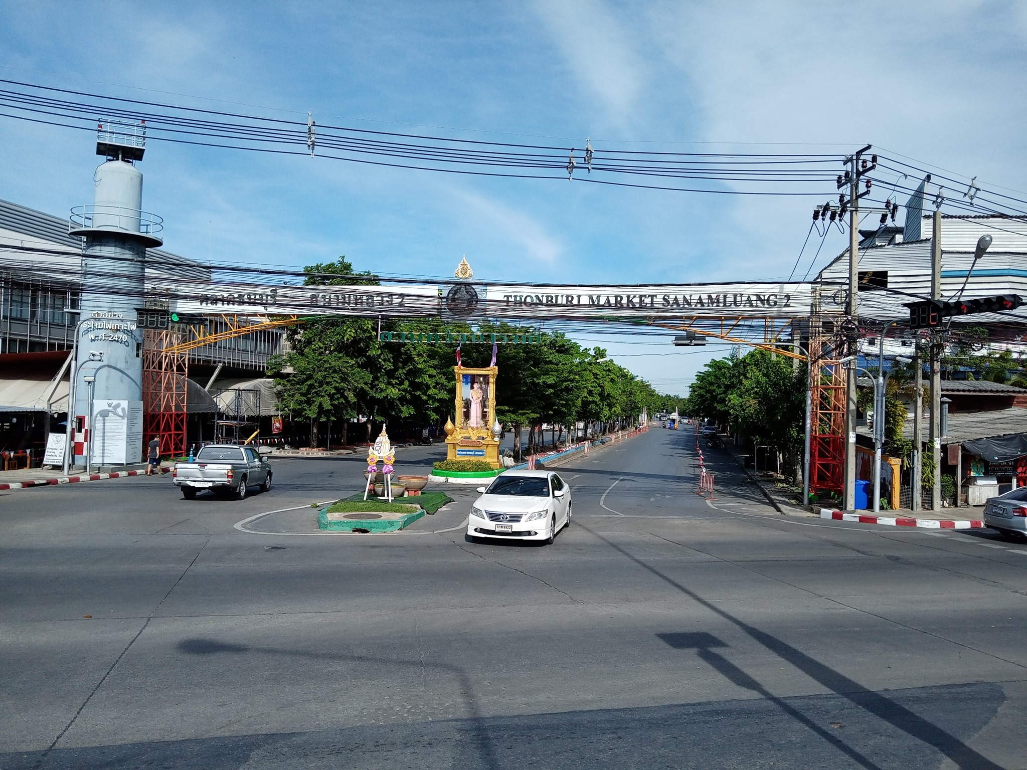 ทางเข้าสนามหลวง 2 หรือ ตลาดธนบุรี